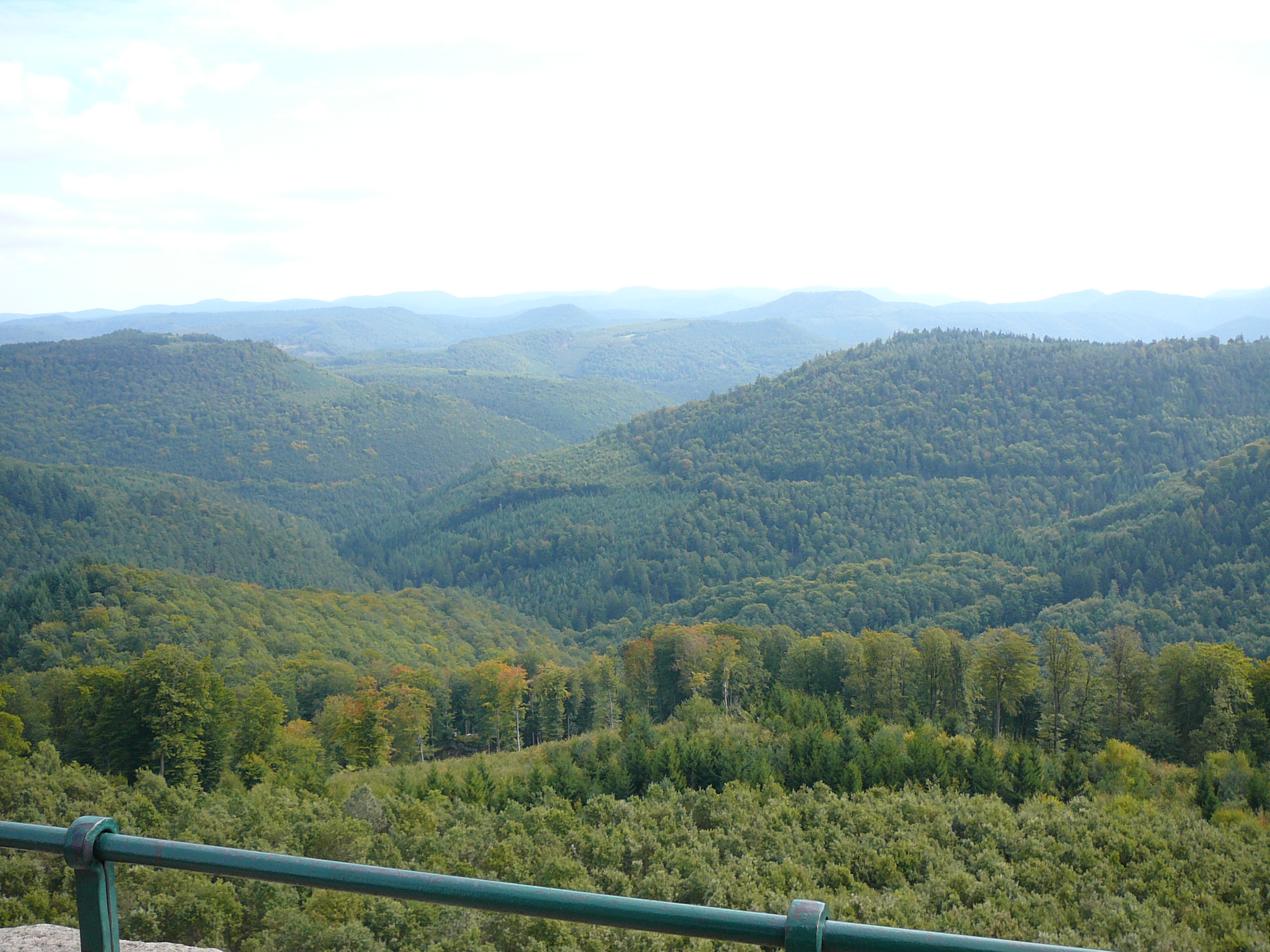 Blick vom Luitpoldturm auf dem Weißenberg nach Osten